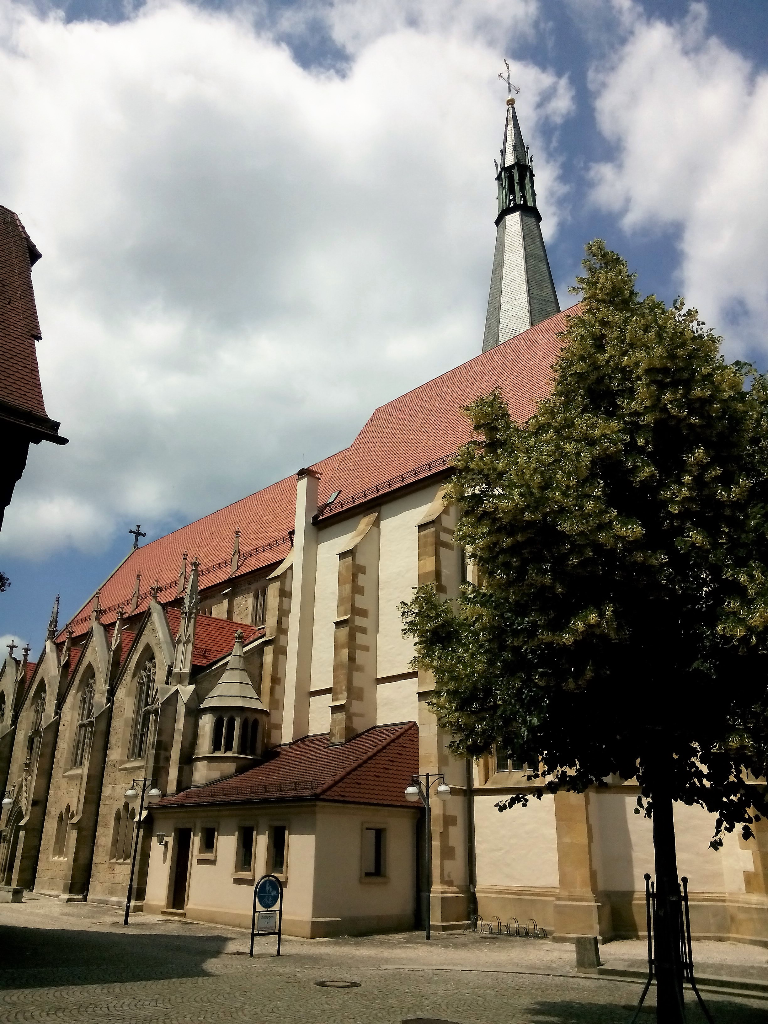 Evang. Stiftskirche vom Vorplatz des Rathauses Schlössle aus gesehen